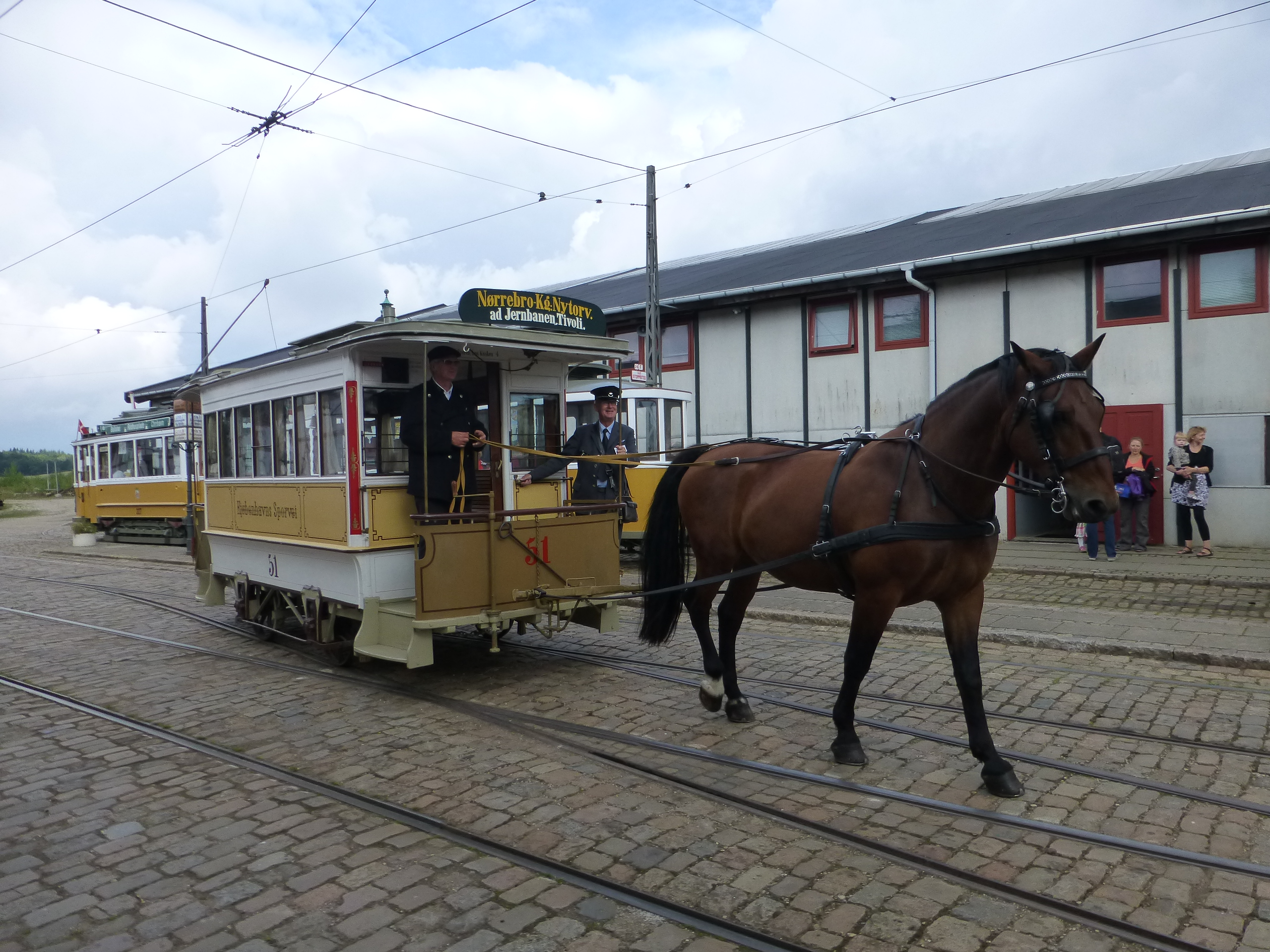 Old tram from Copenhagen KSS 51 on Sporvejsmuseet Skjoldenæsholm in Denmark.